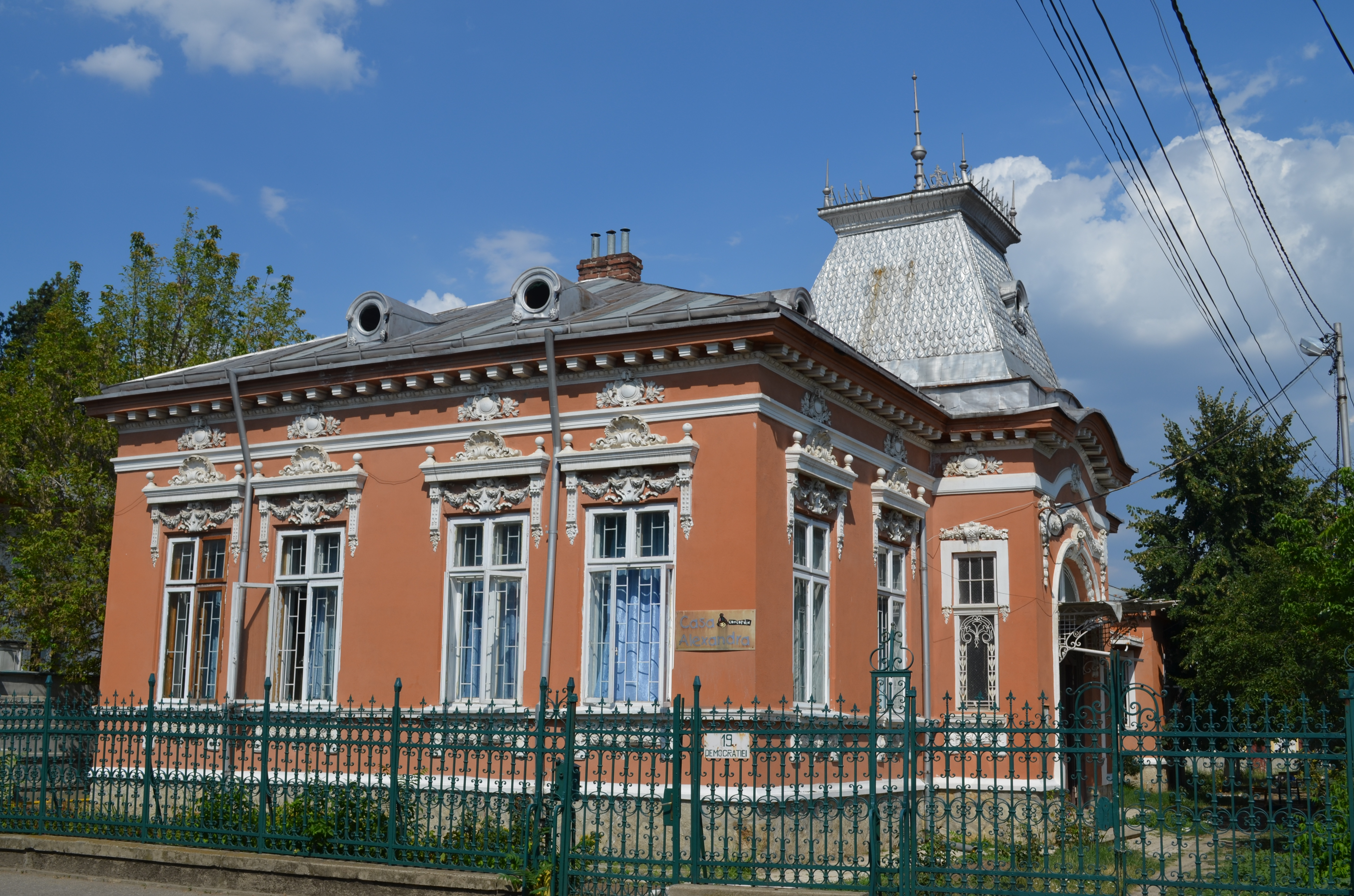 Casă, Str. Democrației nr. 19, azi Casa "Alexandra" a Organizației Umanitare Concordia, Ploiești